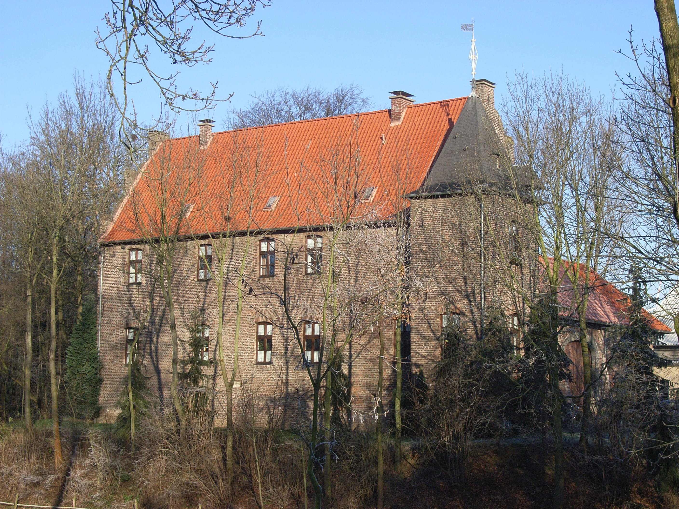 Haus Paland, und ehemaliger Wassergraben in Erkelenz Borschemich